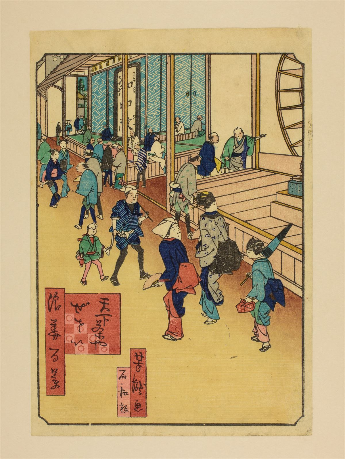 1800年代。里の家芳瀧/画。浪花百景 102枚のうちの1枚。大阪市立中央図書館蔵。